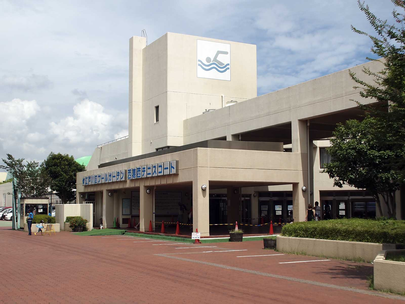 江戸川区西葛西にあった江戸川区プールガーデン。プール休業期間はテニスコートとして営業していたが、プールは2013年に閉鎖された。テニスコートは2014年に営業再開予定。